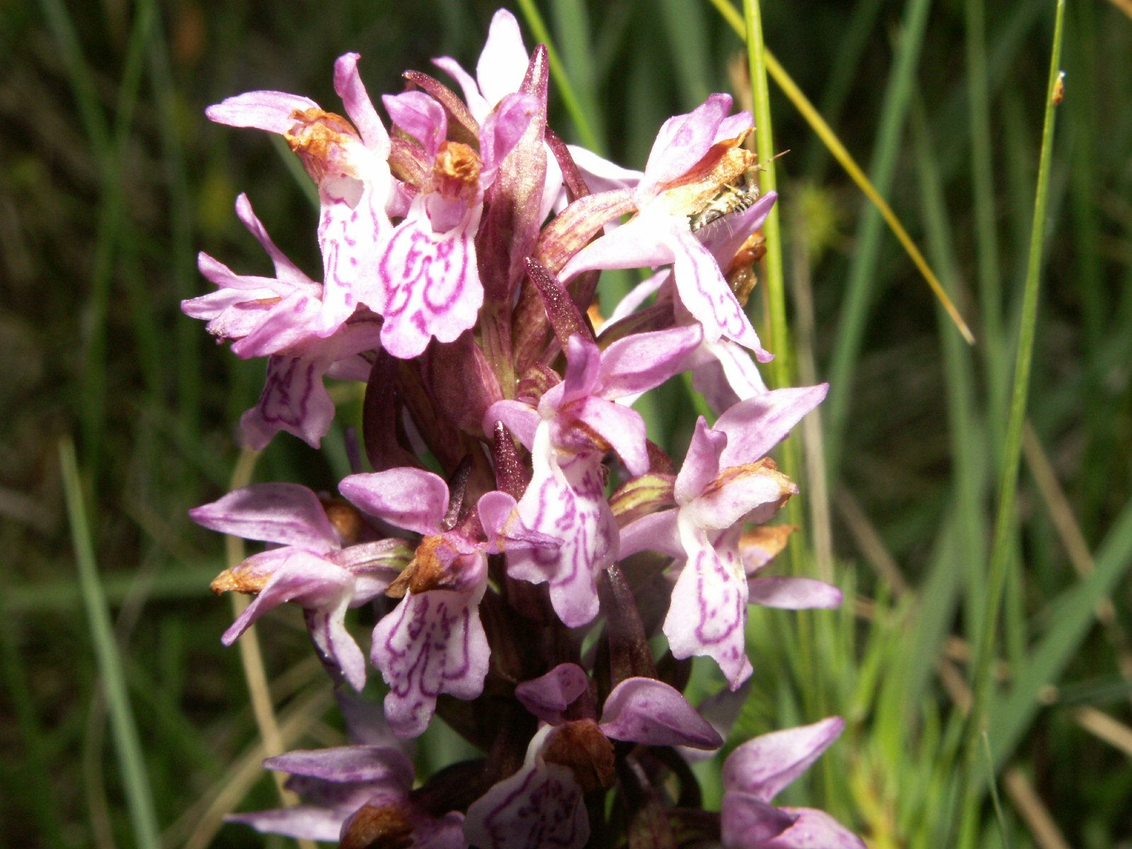 Dactylorhiza cruenta, Lithuania